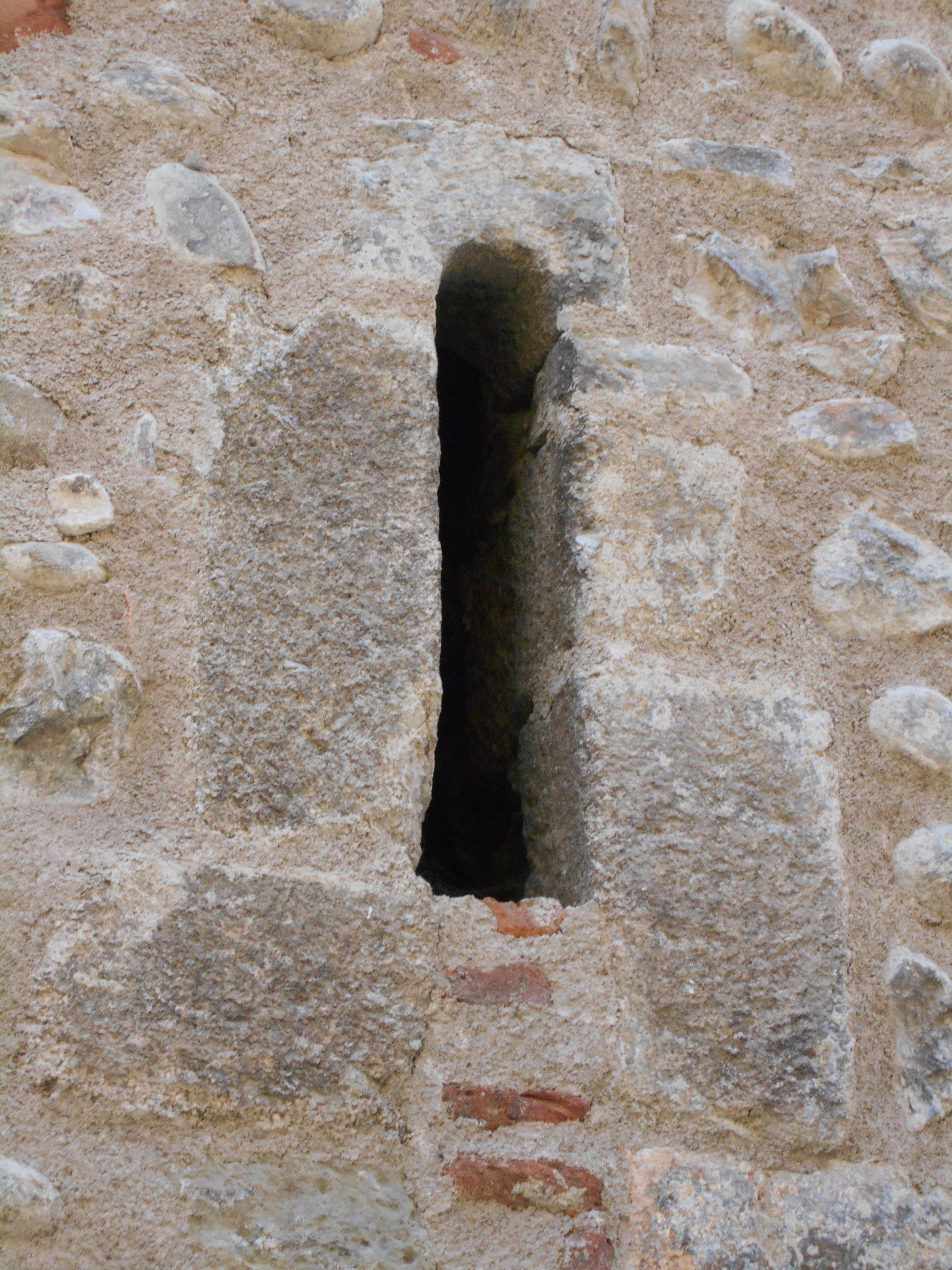 Restes del castell i palau reial de Millars